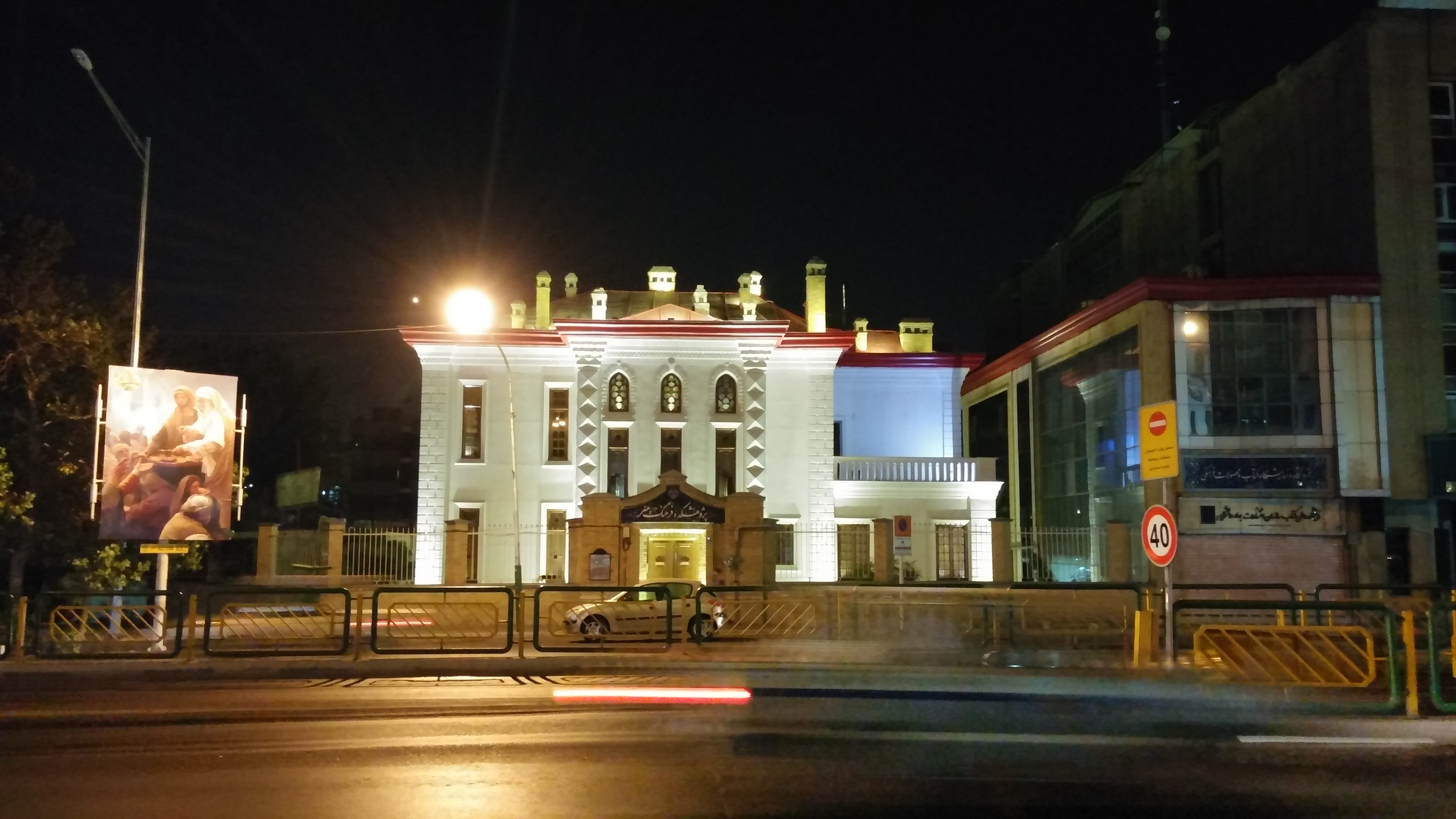 ساختمان گیو